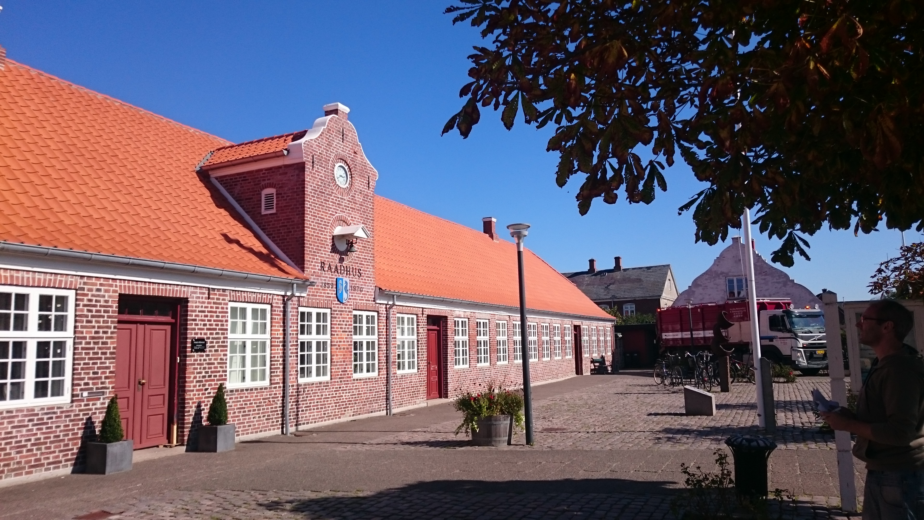 Nordby Borgerskole